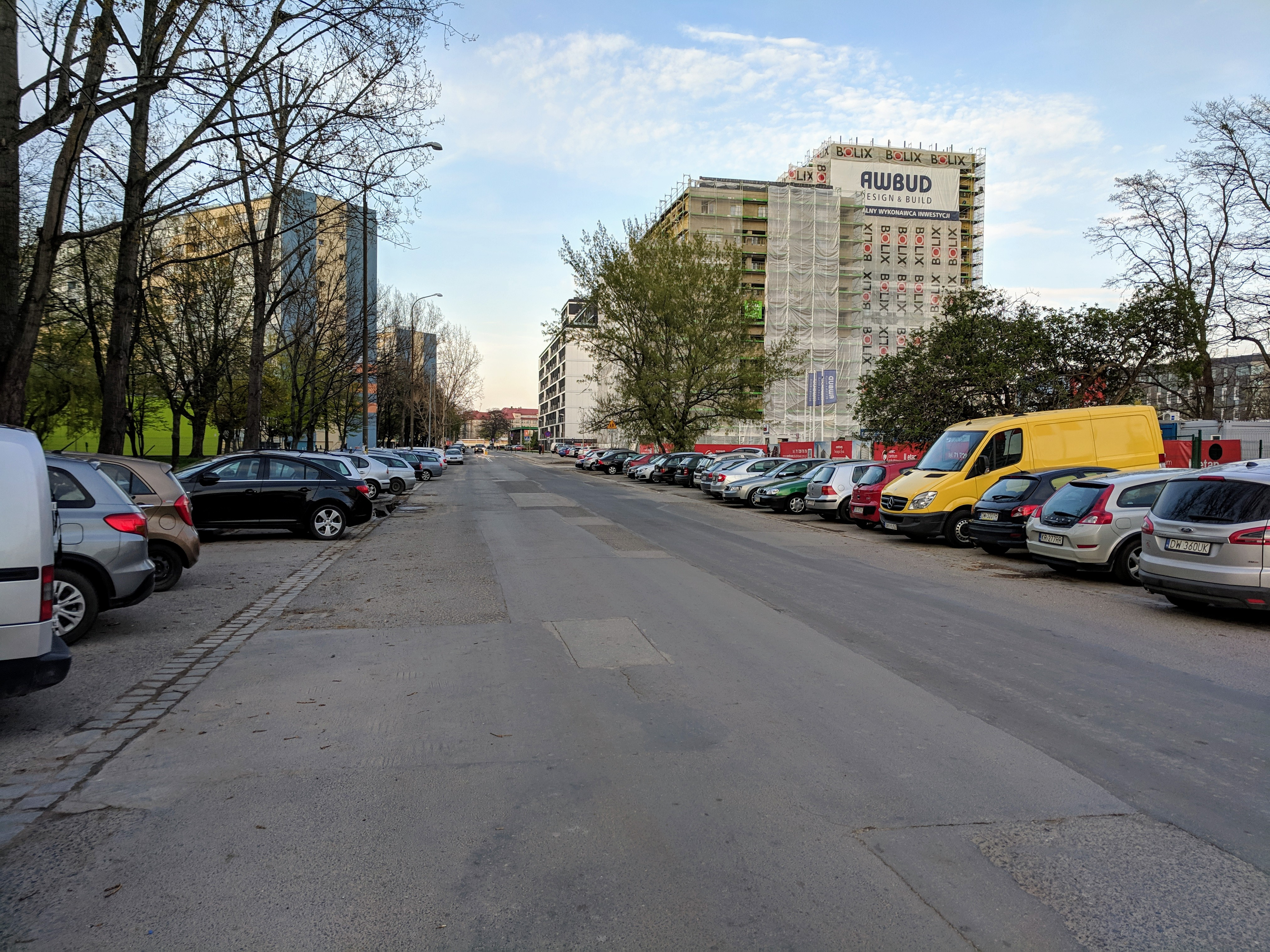 Widok ul. Gwiaździstej od połowy jej długości w kierunku północno-wschodnim. Po prawej widoczna budowa II etapu Nowego Centrum Południowego (zasłonięta siatką z reklamą Awbud), nieco dalej ukończony etap I.